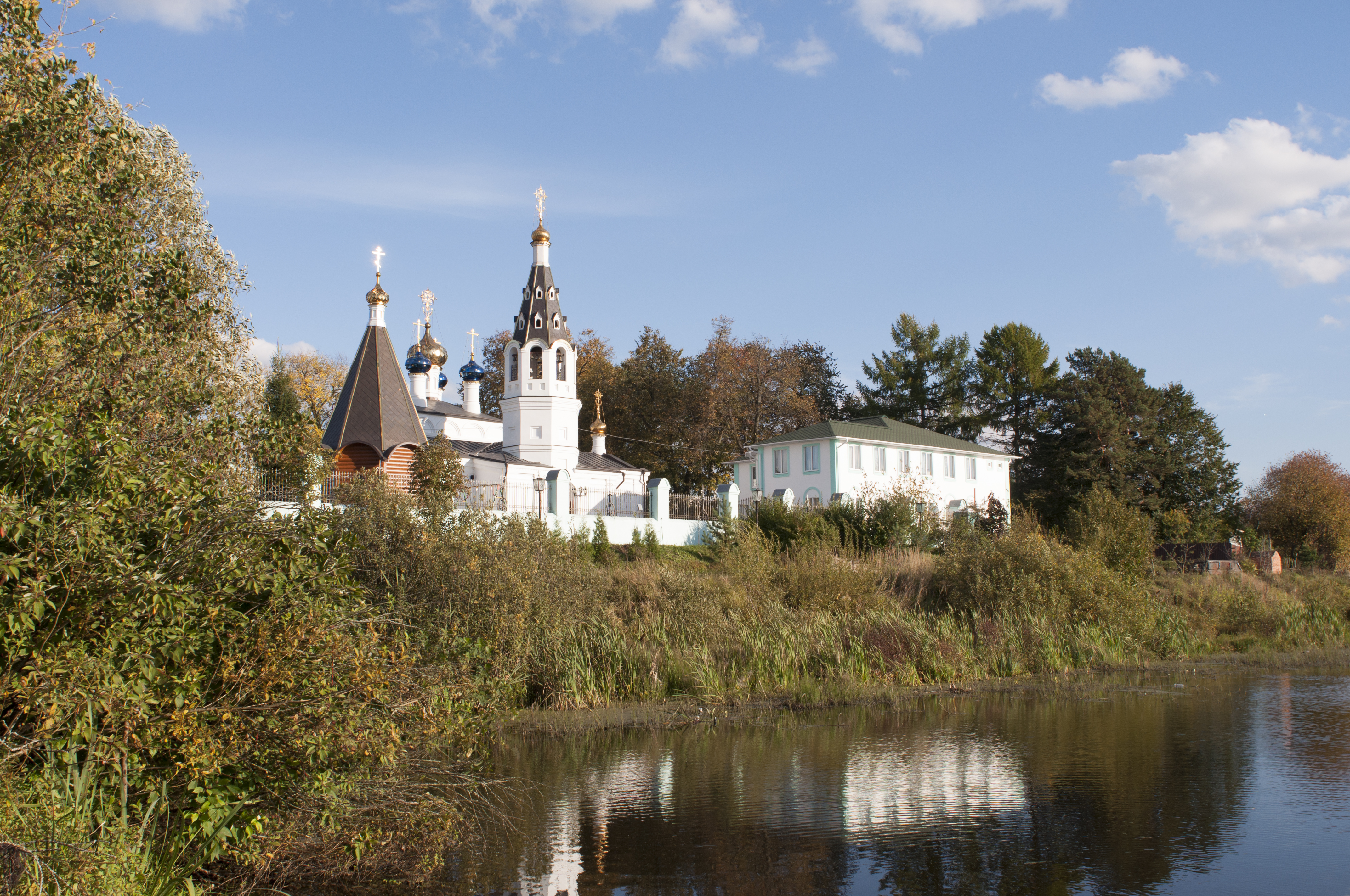 Church of Our Lady and the fence of the house (the Church of St. Nicholas)